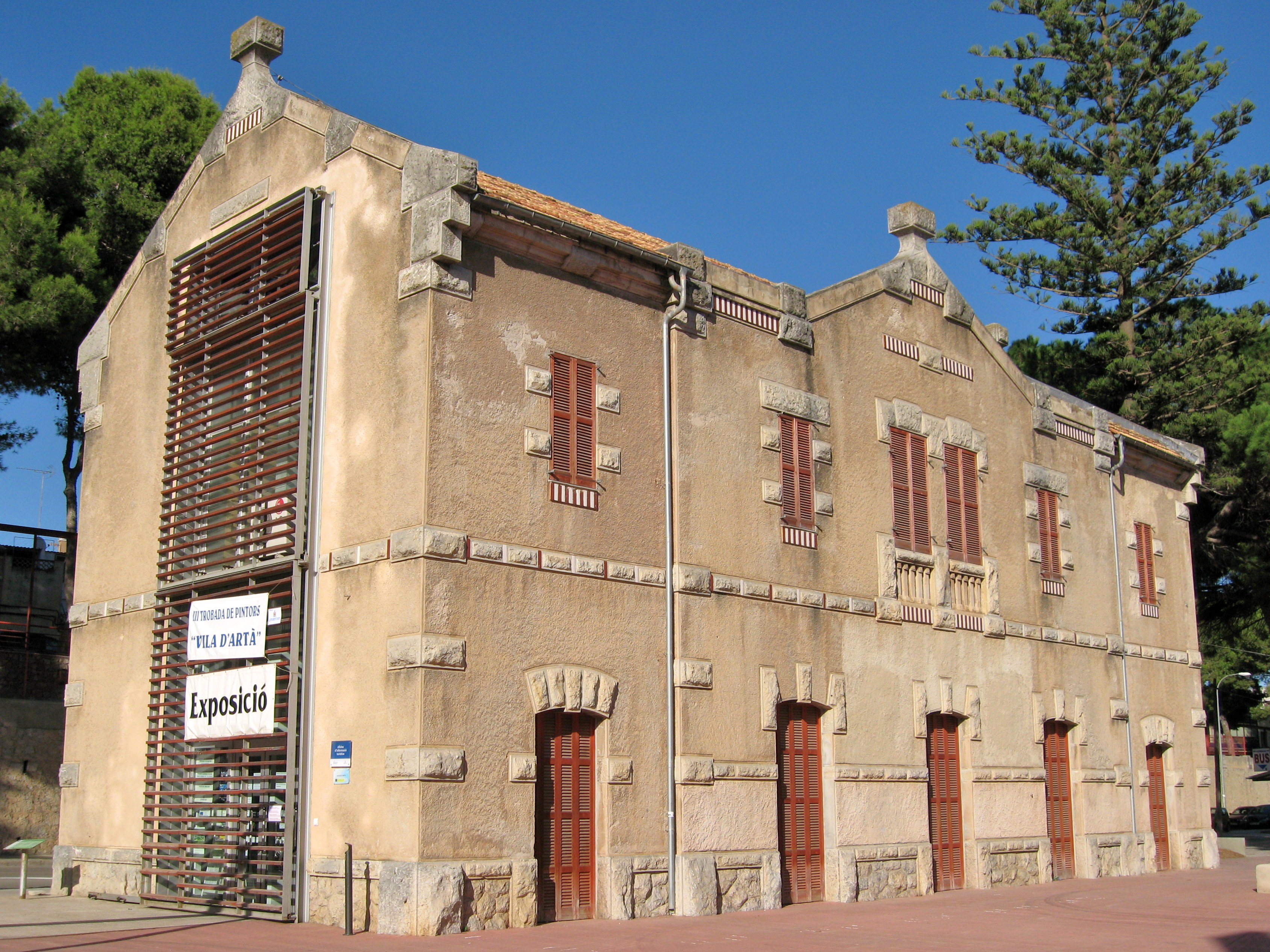 Altes Bahnhofsgebäude von Artà, Mallorca, Spanien